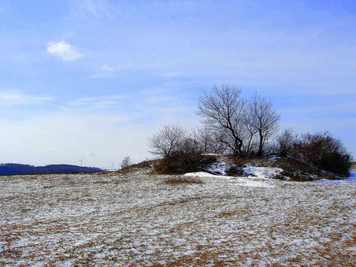 Výšinné opevněné sídliště - hradiště Staré hradisko, archeologické stopy (Malé Hradisko), Na hradisku, Malé Hradisko